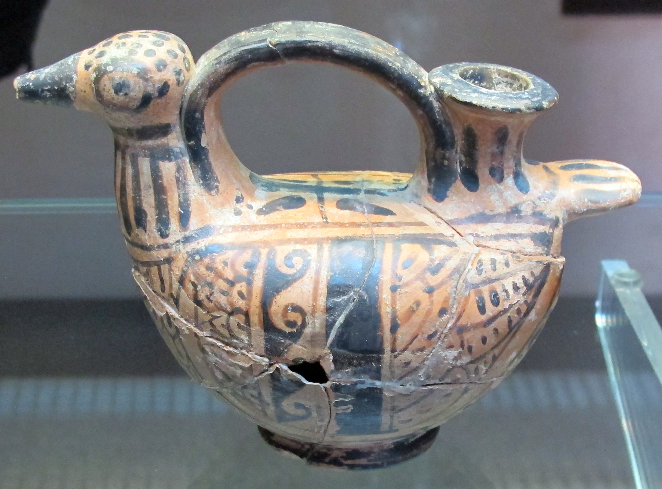 Museo Claudio Faina